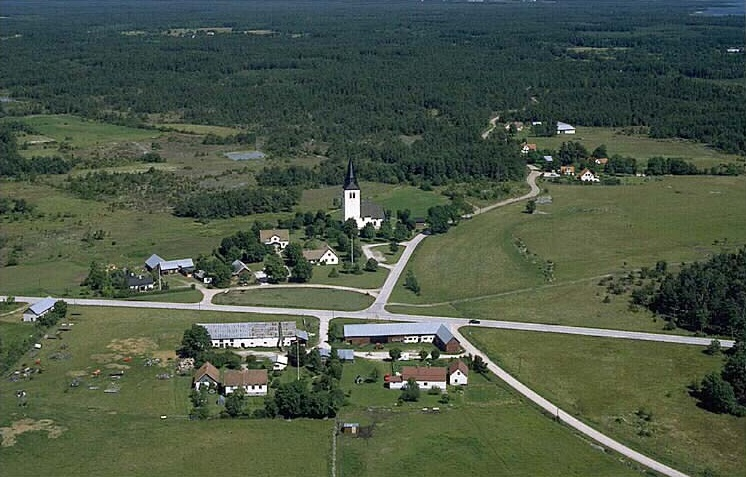 Anga kyrka i bildens mitt. Motiv: Anga Nyckelord: Flygbilder, Riksintressen Kategori: Miljöer, Odlingslandskap Anga kyrka i bildens mitt. Länsväg 146 går förbi söder om kyrkan.